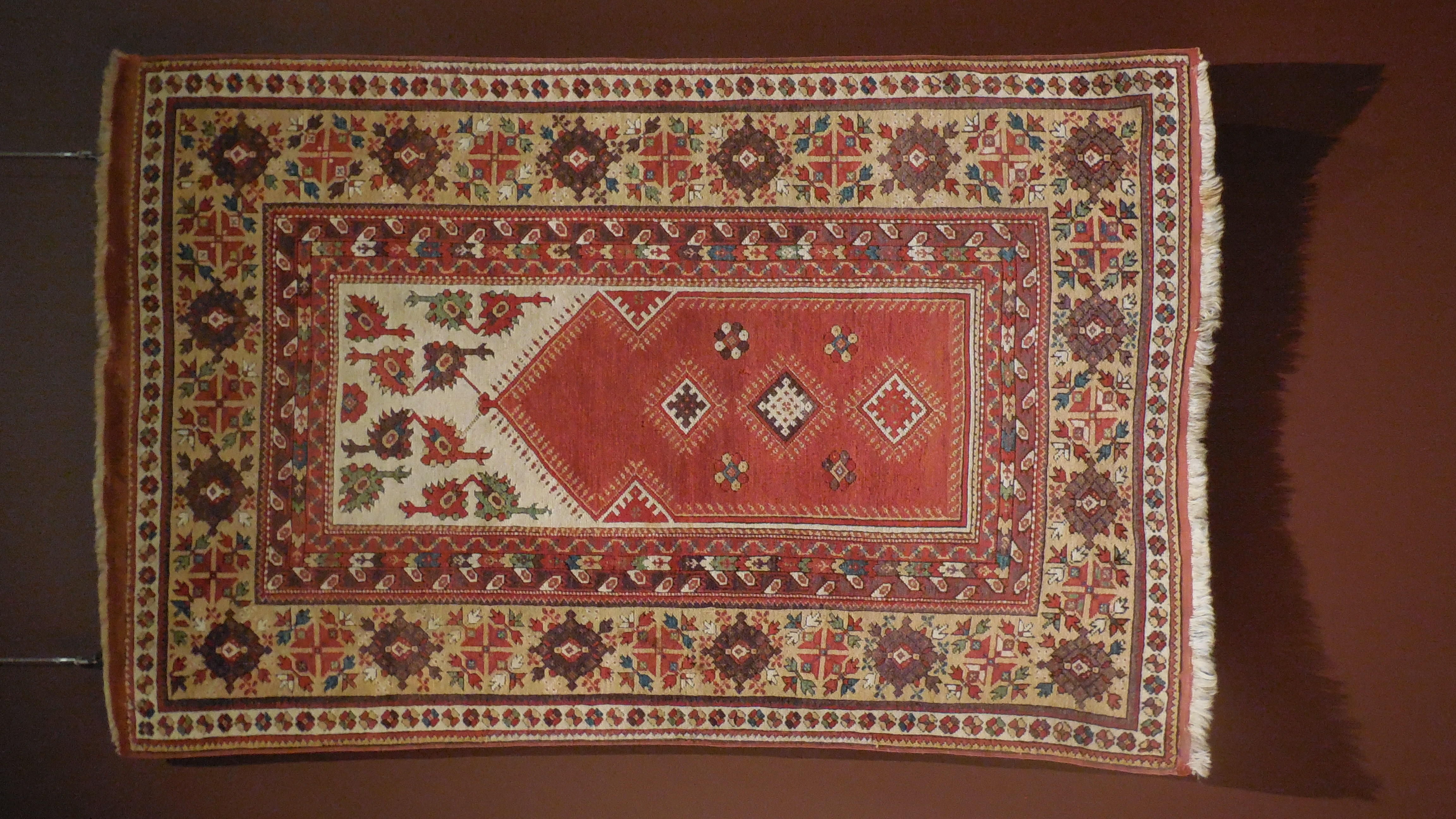 Carpets ; Rugs